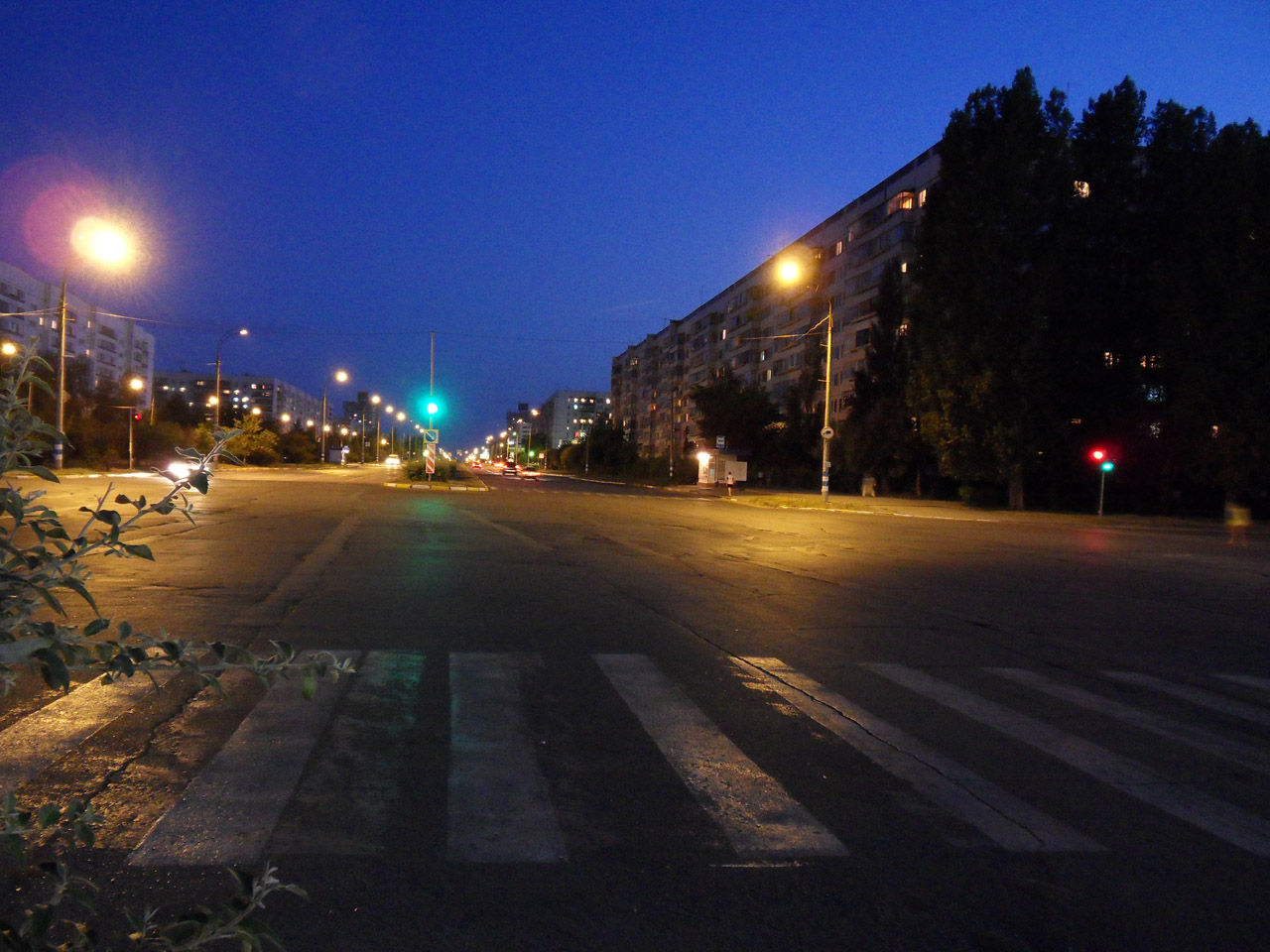 Ульяновск, проспект Ленинского комсомола.